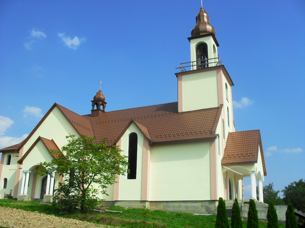 Kościół pw. MBNP w Sowinie